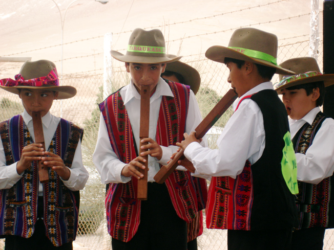 Alumnos del Colegio Padre Luis Gallardo “Nayra Inti” interpretando con sus tarkas una tarkeada (dirigido por el profesor Pablo Vásquez).